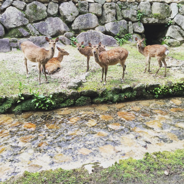 Venados al lado de un pequeño rio en Hiroshima, Japón